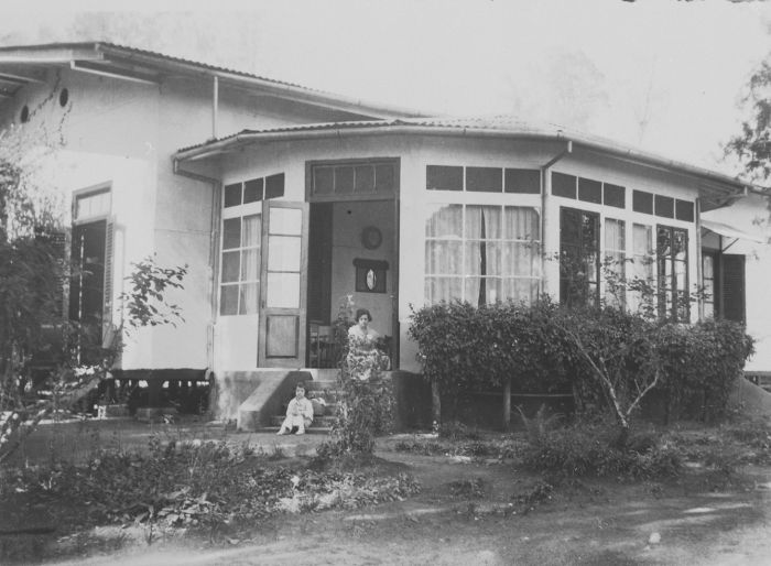 Foto. Adriana van Deun-Louwerse met dochter Pat op de trap van hun vakantiehuis in Poespo